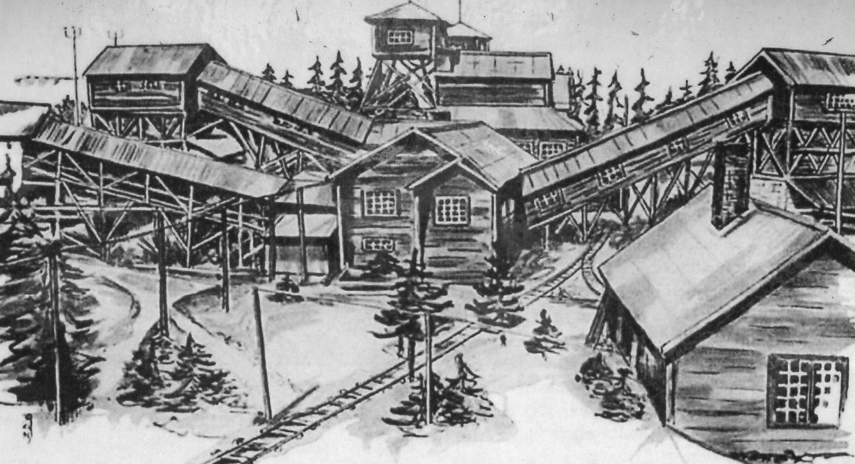 Tuna-Hästberg, gamla anläggningarna uppe på höjden norr om samhället.